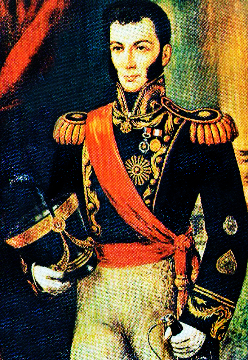 Juan Antonio Alvarez